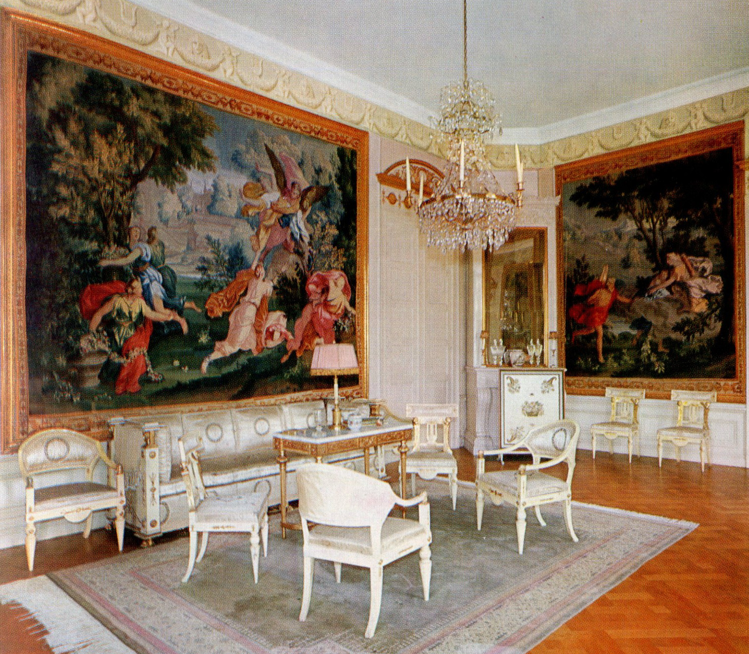 Broby gård, gobelängsalongen